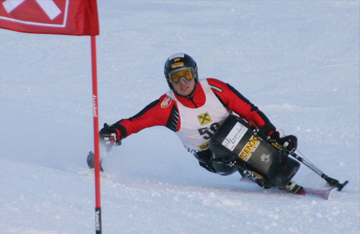 Der österreichische Behindertensportler Philippp Bonadimann.